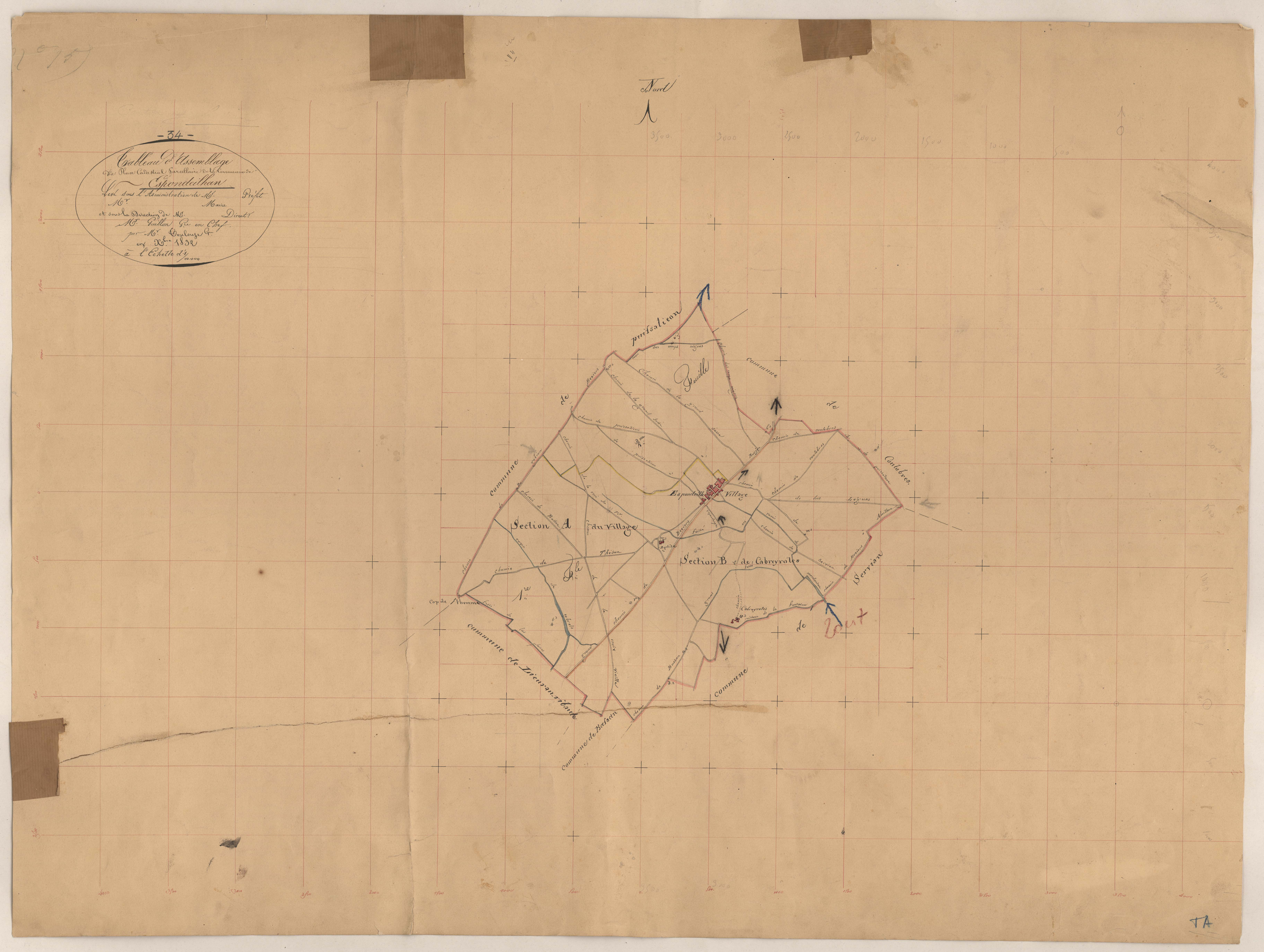 Espondeilhan. - Cadastre napoléonien : tableau d'assemblage.